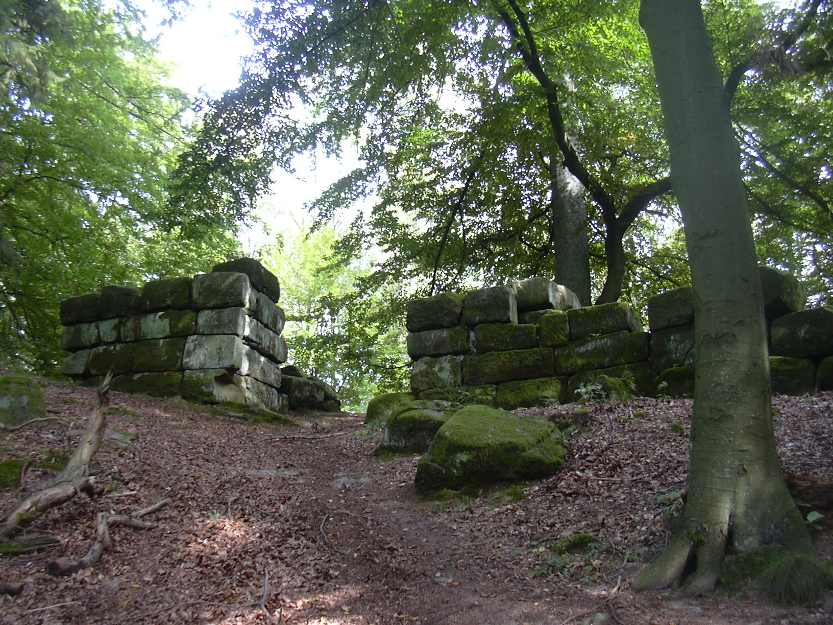 Heidelsburg (Roman castrum), near Waldfischbach-Burgalben / Palatinate, Germany